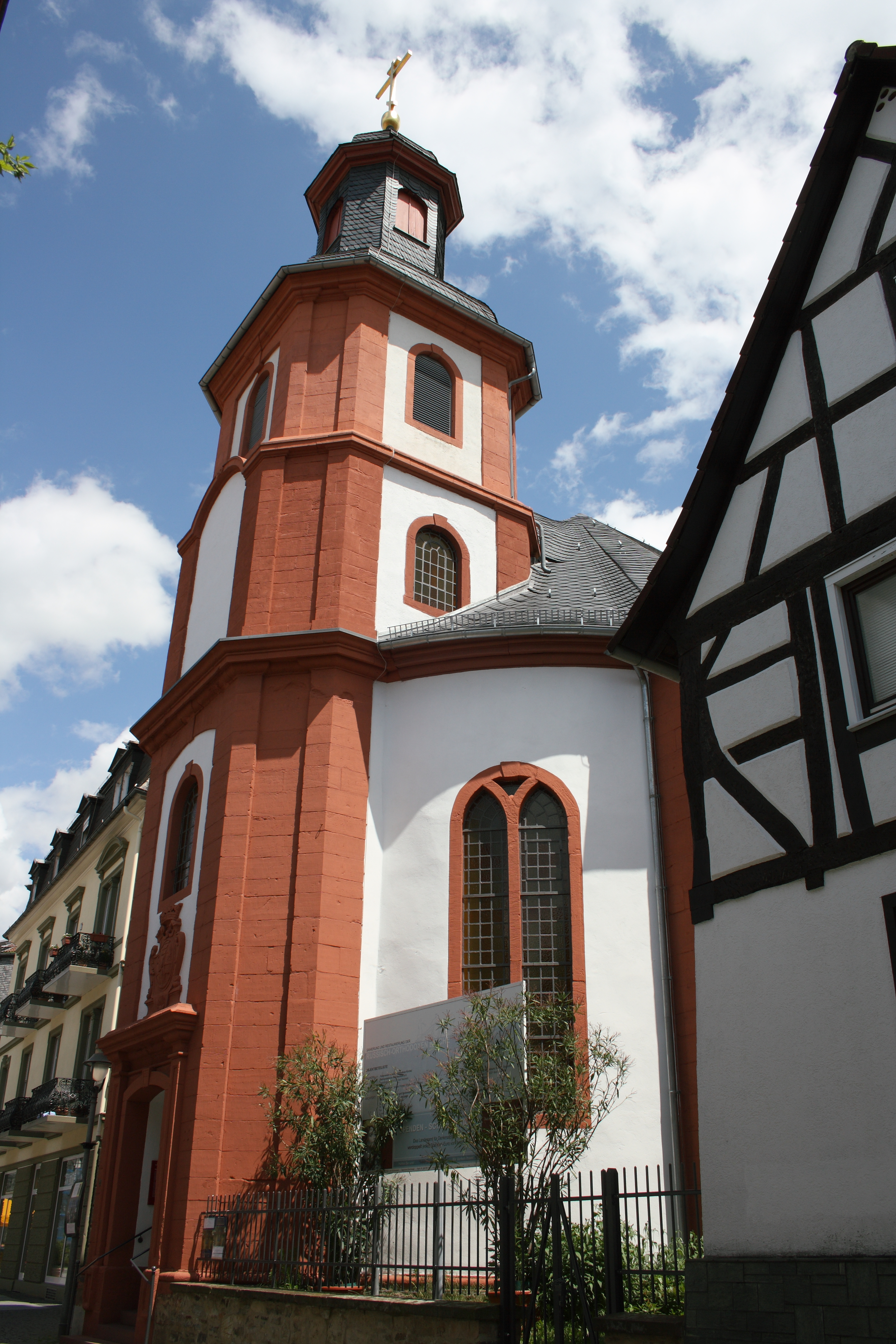 Reinhardskirche in Bad Nauheim im Wetteraukreis (Hessen)